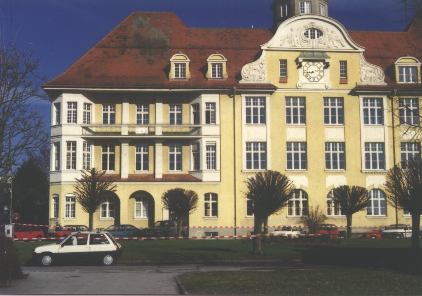 grammar school in Deggendorf, Germany